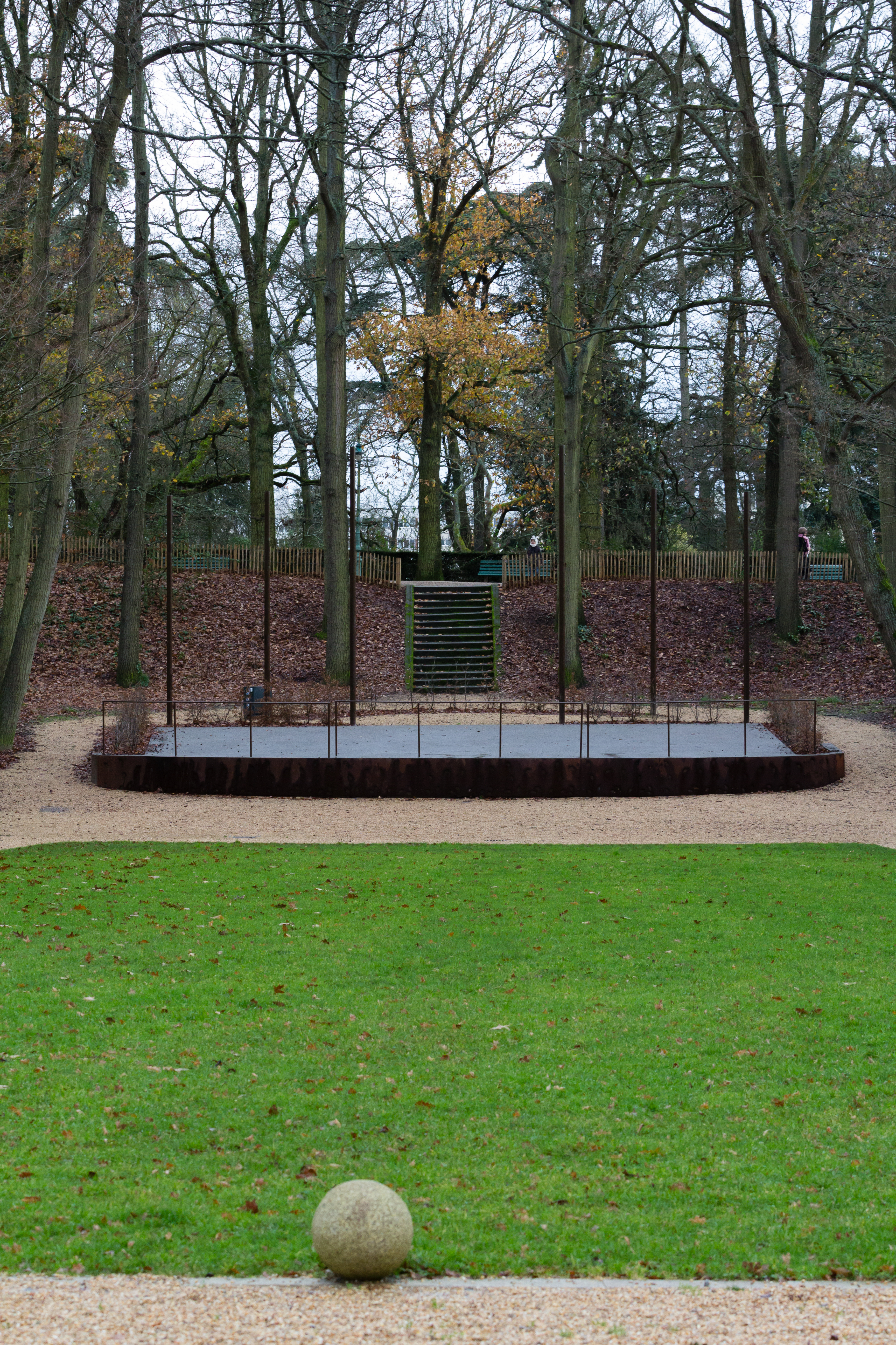 Théâtre de verdure aménagé dans « l'Enfer » du parc du Thabor de Rennes.